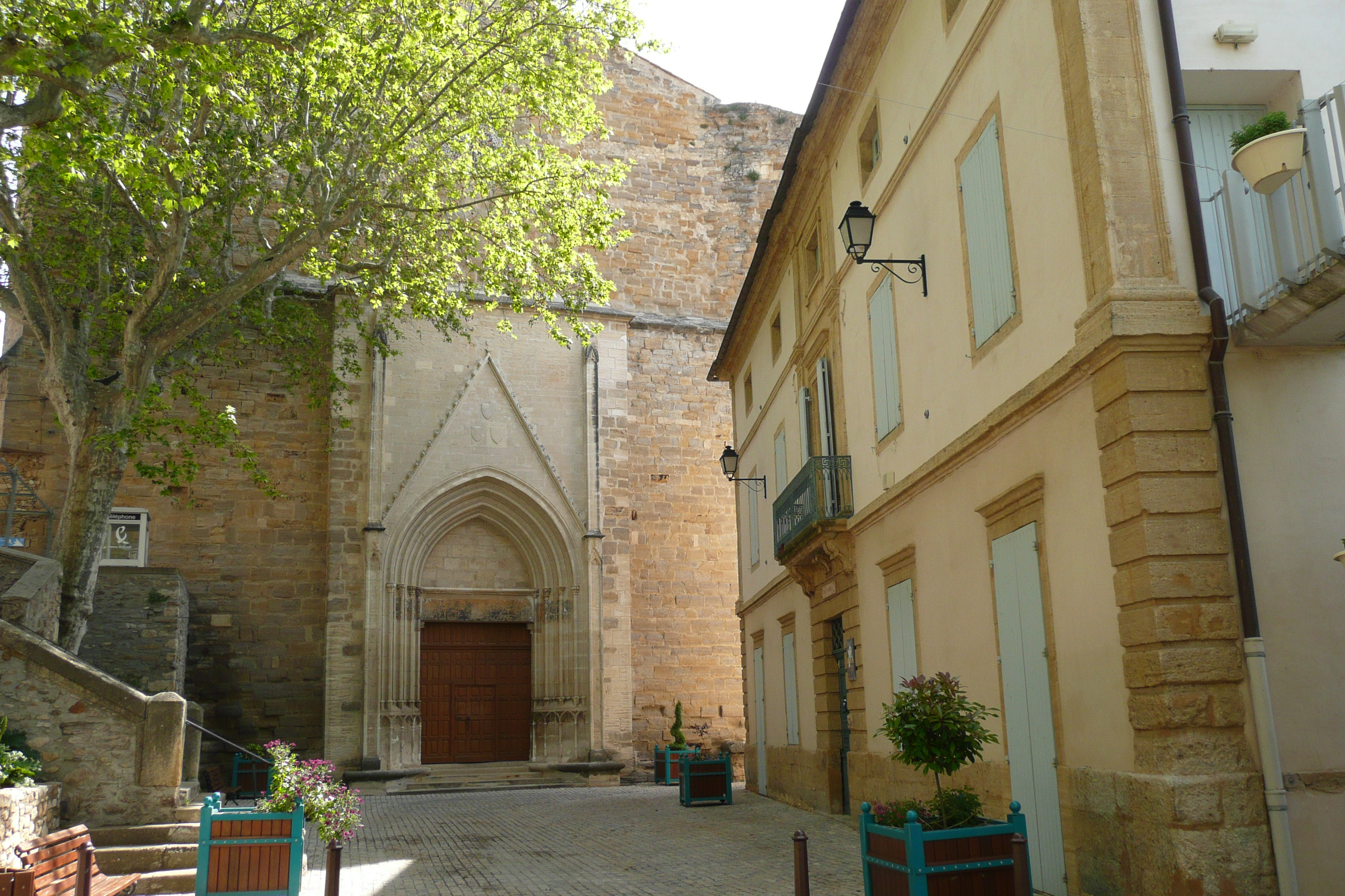 Eglise à Laudun-l'Ardoise.